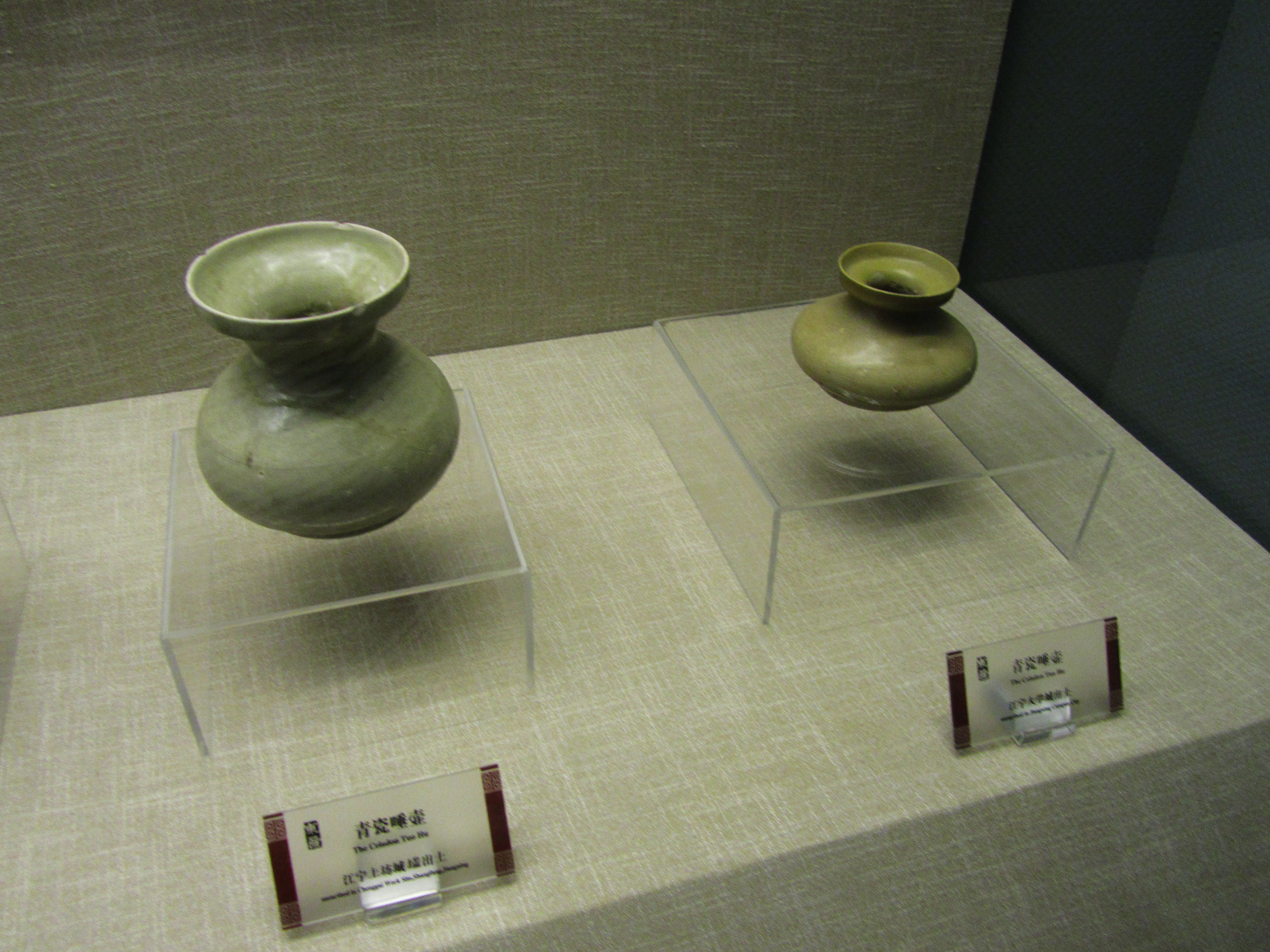 东晋青瓷唾壶，左江宁上坊城盖出土，右江宁大学城出土，江宁博物馆藏 。